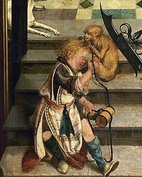 Retable d'Aix-la-Chapelle - Détail Volet gauche - vue de Cologne